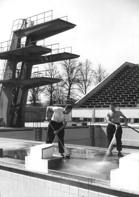 Berlin, Schwimmstadion am Friedrichshain Zentralbild Weiß 9 Mot. 24.4.1954 Frühling im Friedichshain UBz: Grossreinemachen im Schwimmstadion "Karl Friedrich Friesen".